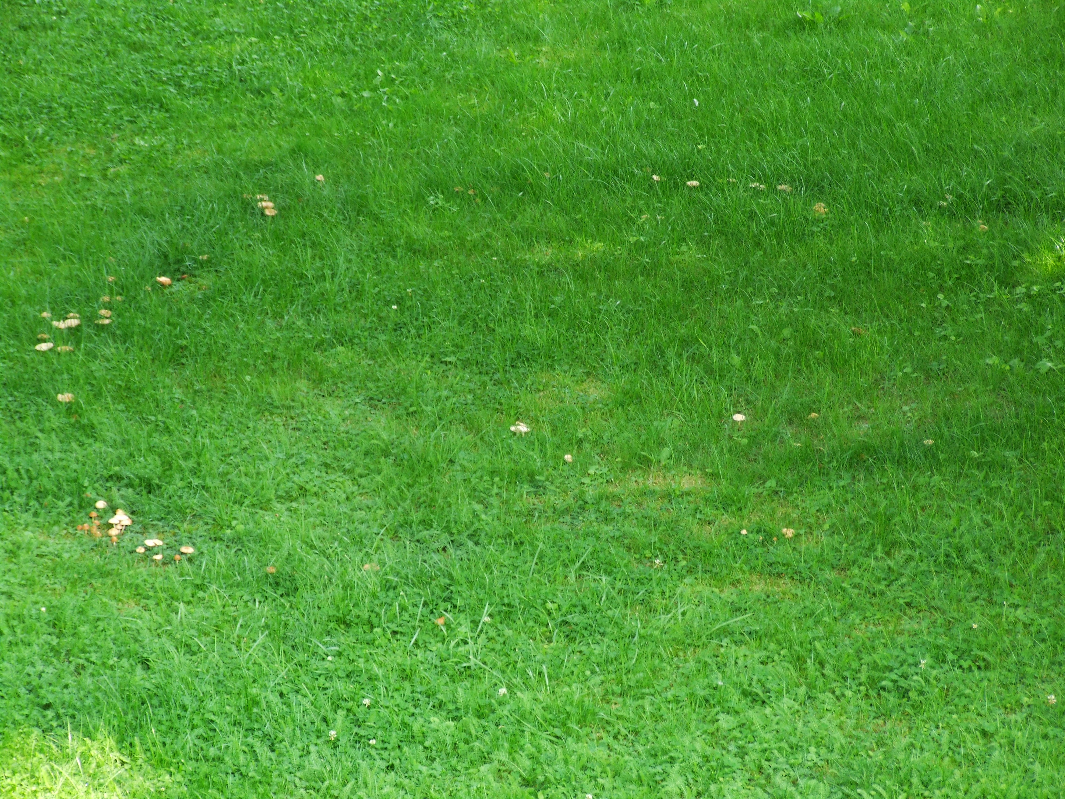 Hexenkreis, unvollständig